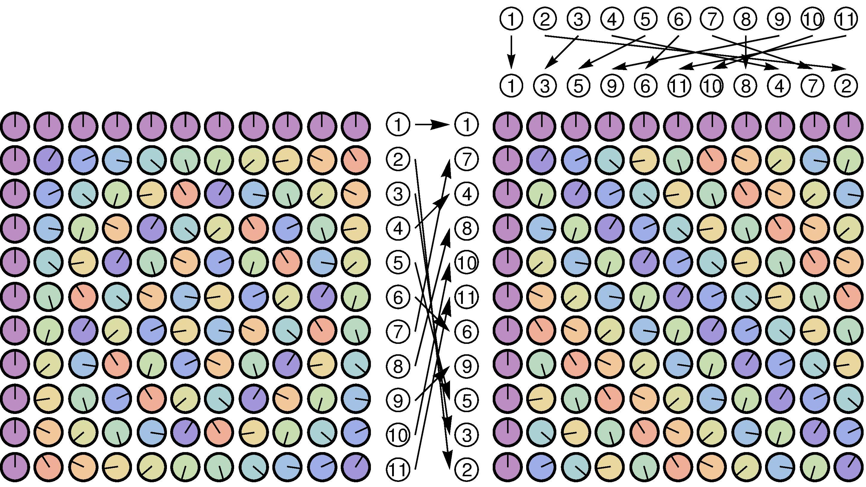 Raderのアルゴリズムによる高速フーリエ変換の概念図。 色のついた時計と針によりDFT行列が表されている。 11の原始根である2を用いて、列については{2^k (mod 11)}、行については {2^(-k) (mod 11)}の数列により、先頭以外に並び替えを施す。この結果、DFT行列は巡回行列となる。巡回行列を作用させることは巡回畳み込みと同値であり、畳込み定理によりFFTを用いた高速化が可能となる。